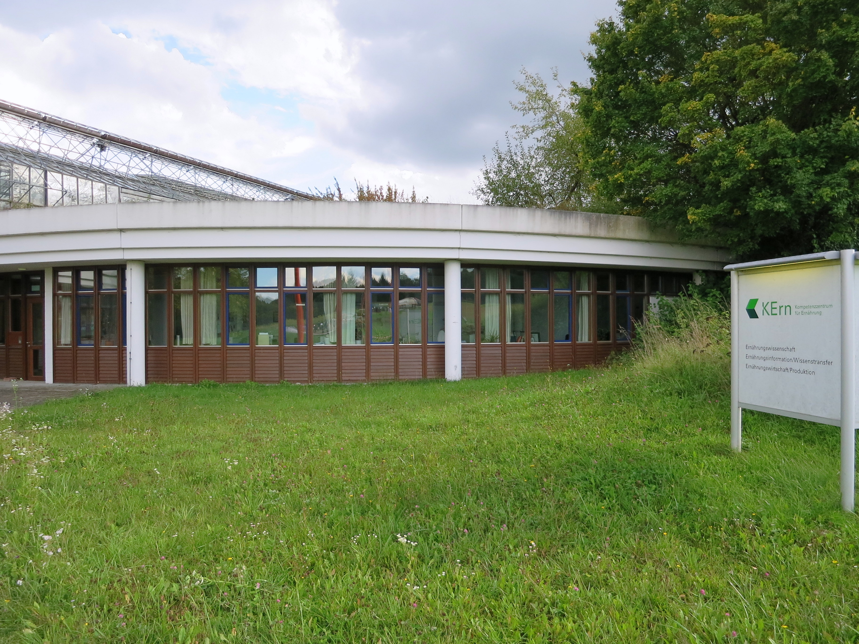 Auf dem Campus Freising-Weihenstephan ist ein Teil des KErn untergebracht